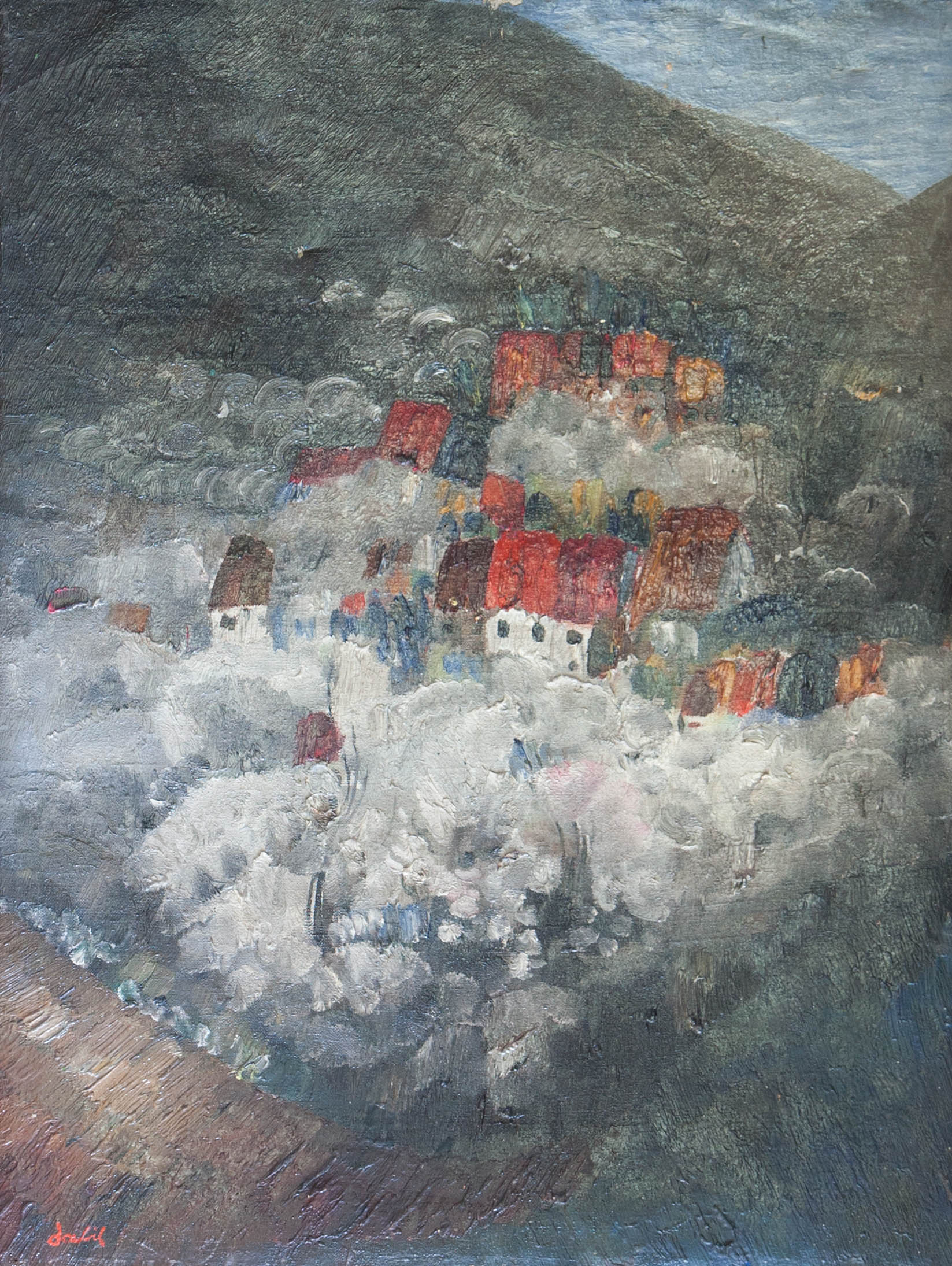 Attribué à Eugène Dabit (1898-1936), Paysage, collection particulière non sourcée.